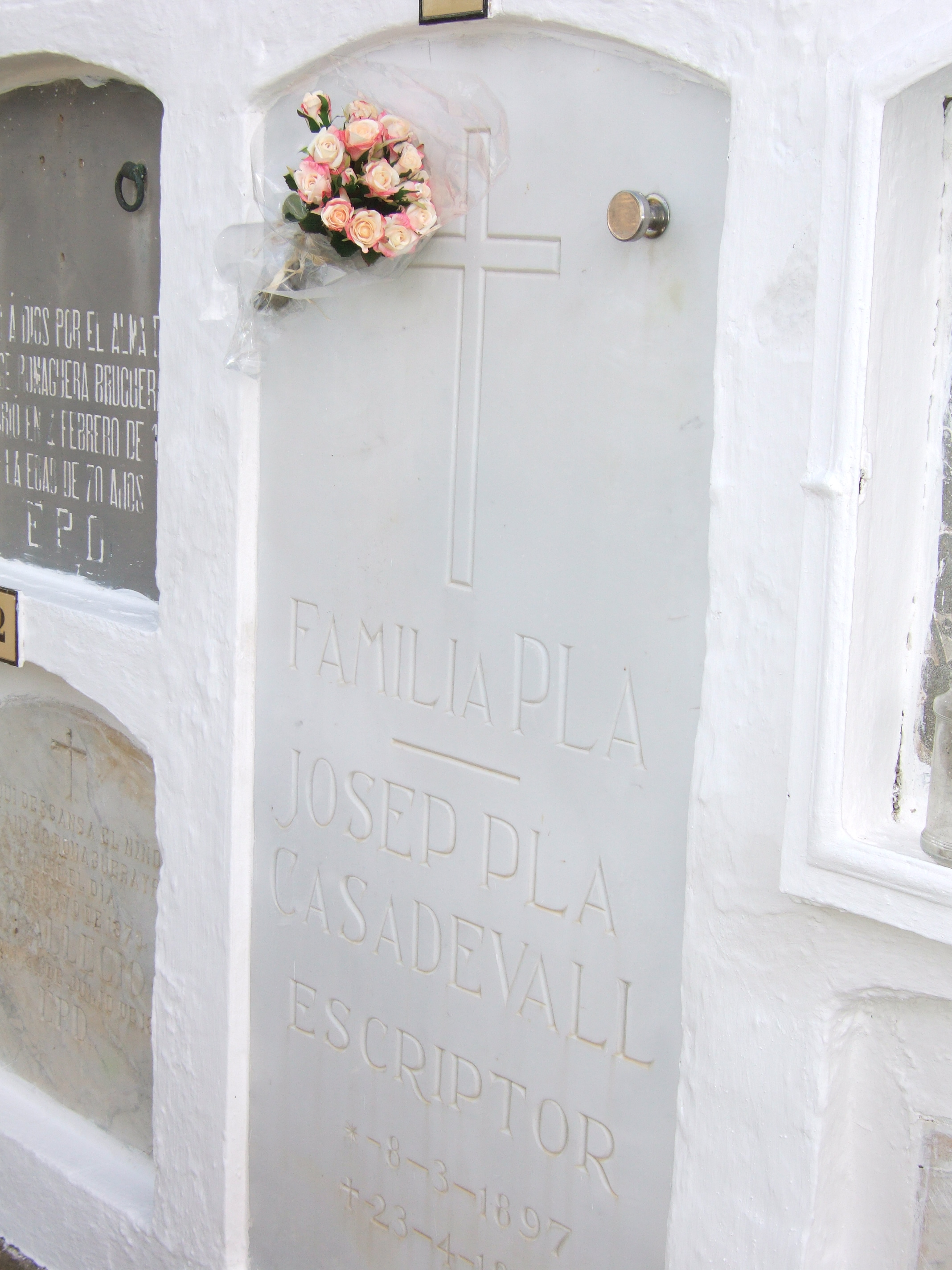 Tomba de Josep Pla, al cementiri de Llofriu (Girona, Espanya). El ram el van posar els "Planautes" de l'Escola Els Arcs (Barcelona). Tumba de Josep Pla, en el cementerio de Llofriu (Gerona, España). El ramo fue colocado por los "Planautes" del colegio Els Arcs (Barcelona).